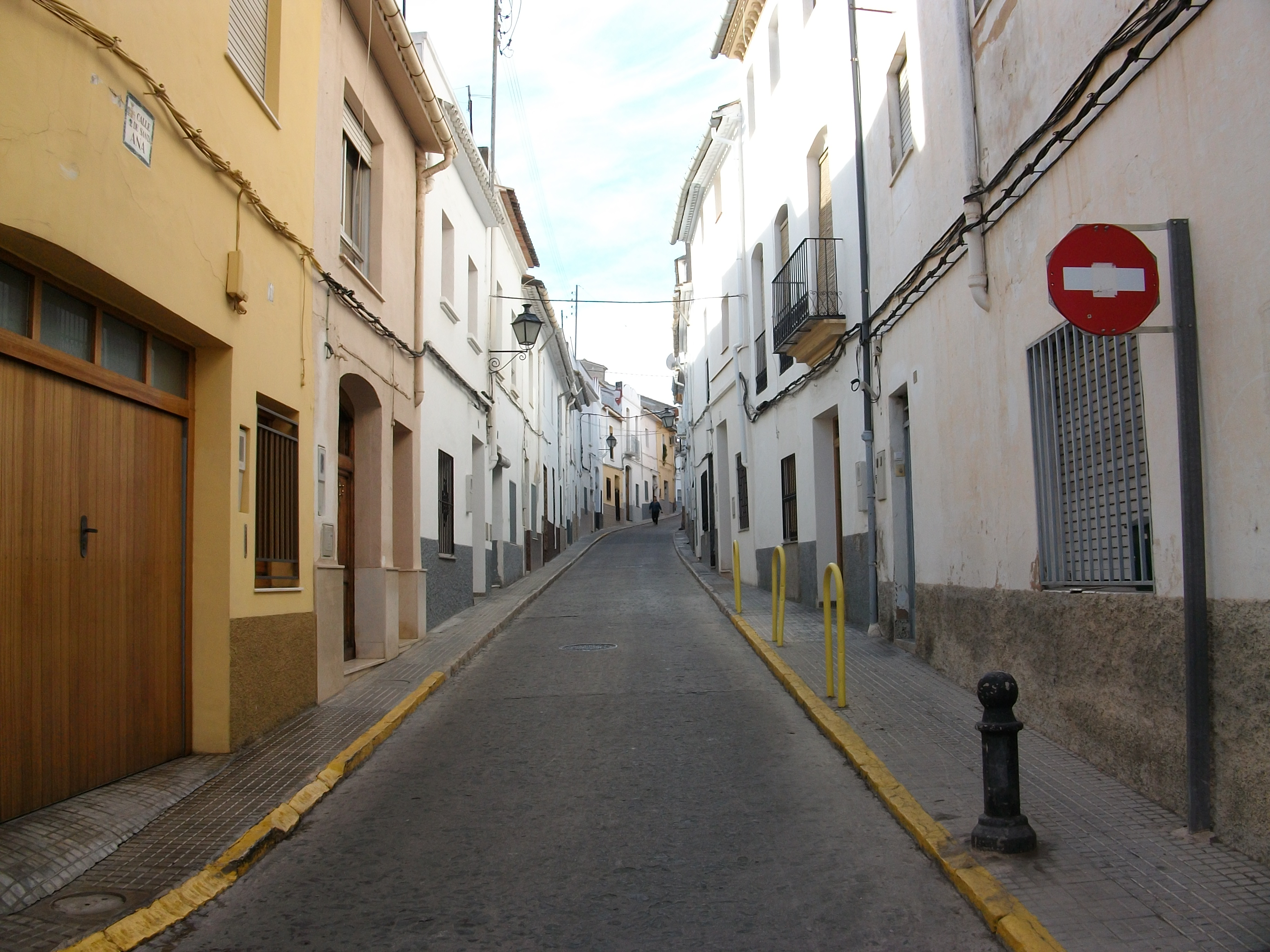 Carrer de Santa Anna d'Oliva, la Safor.